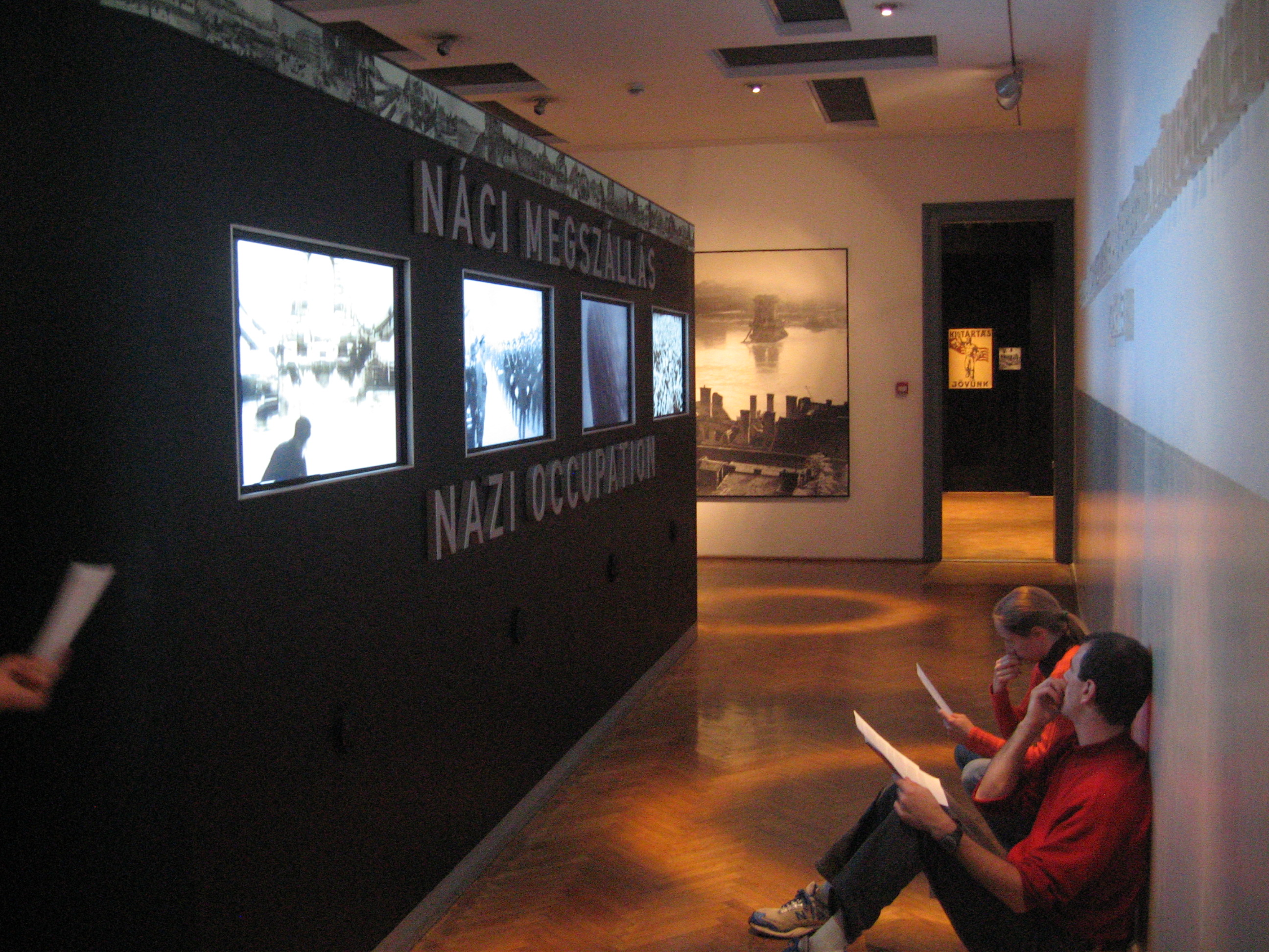 Haus des Terrors, Raum 1